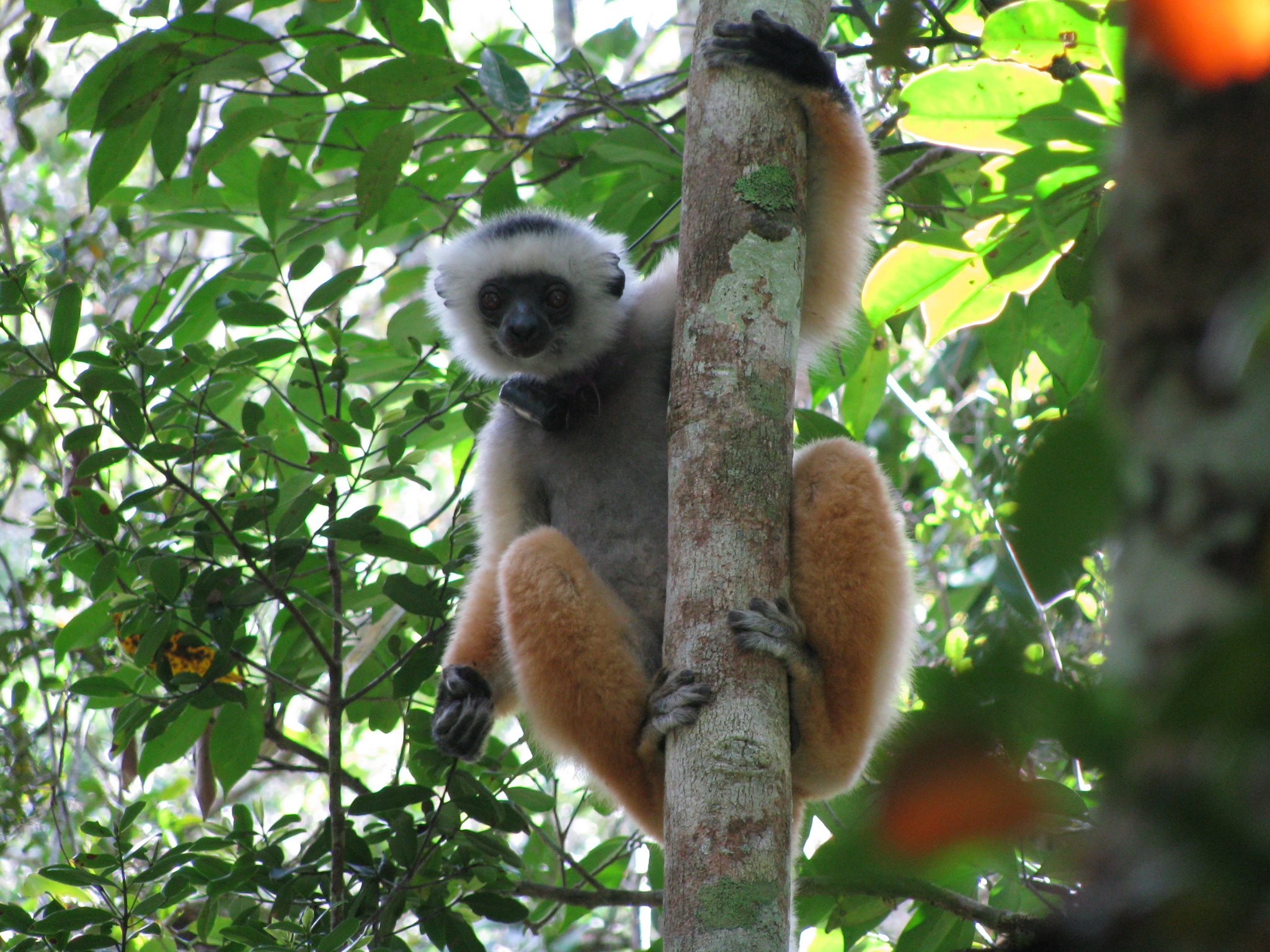 diademed sifaka with radio collar, Andasibe-Mantadia National Park, Madagascar